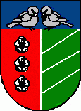 Herb gminy Wróblew